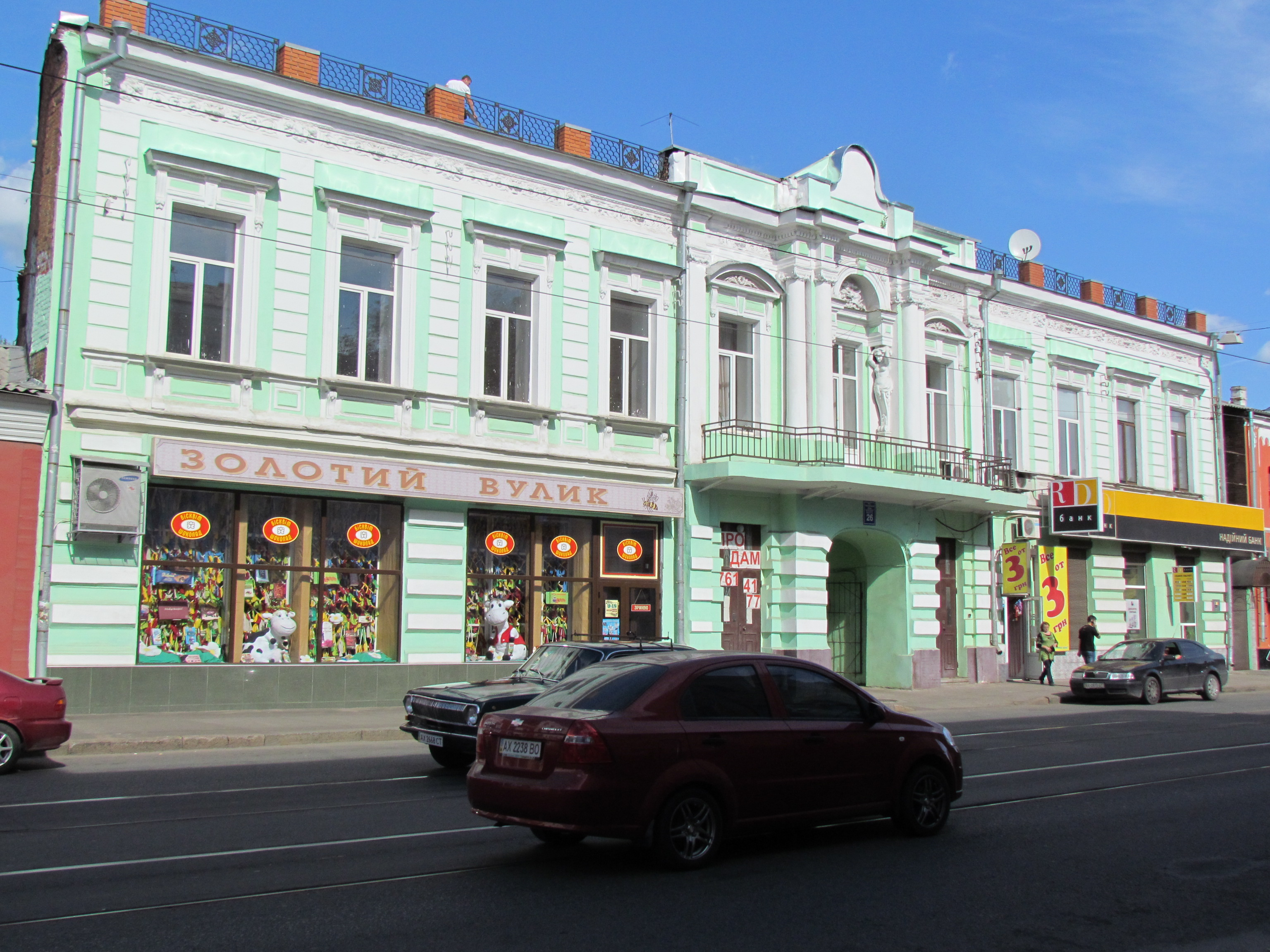 Україна, Харків, вул. Полтавський Шлях, 26